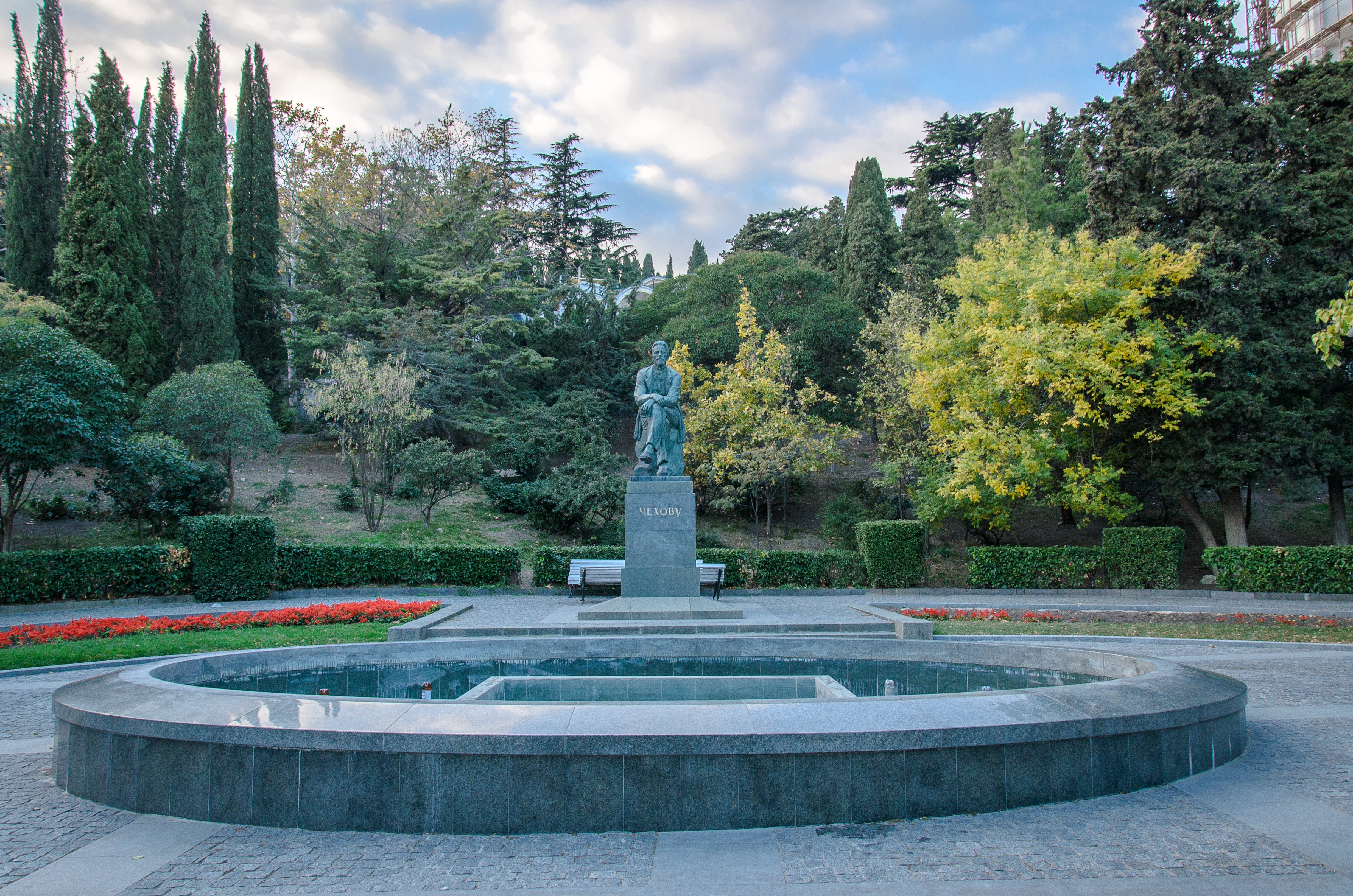 Памятник Чехову А.П. Дата сооружения: 1953 г.: набережная им. В.И.Ленина, Приморский парк им. Ю.А.Гагарина, Ялта, Крым This object is located on the Crimean Peninsula and recognized as cultural heritage by Russia under the monument ID: 8231585000. The legal status of the Crimean region is currently disputed.